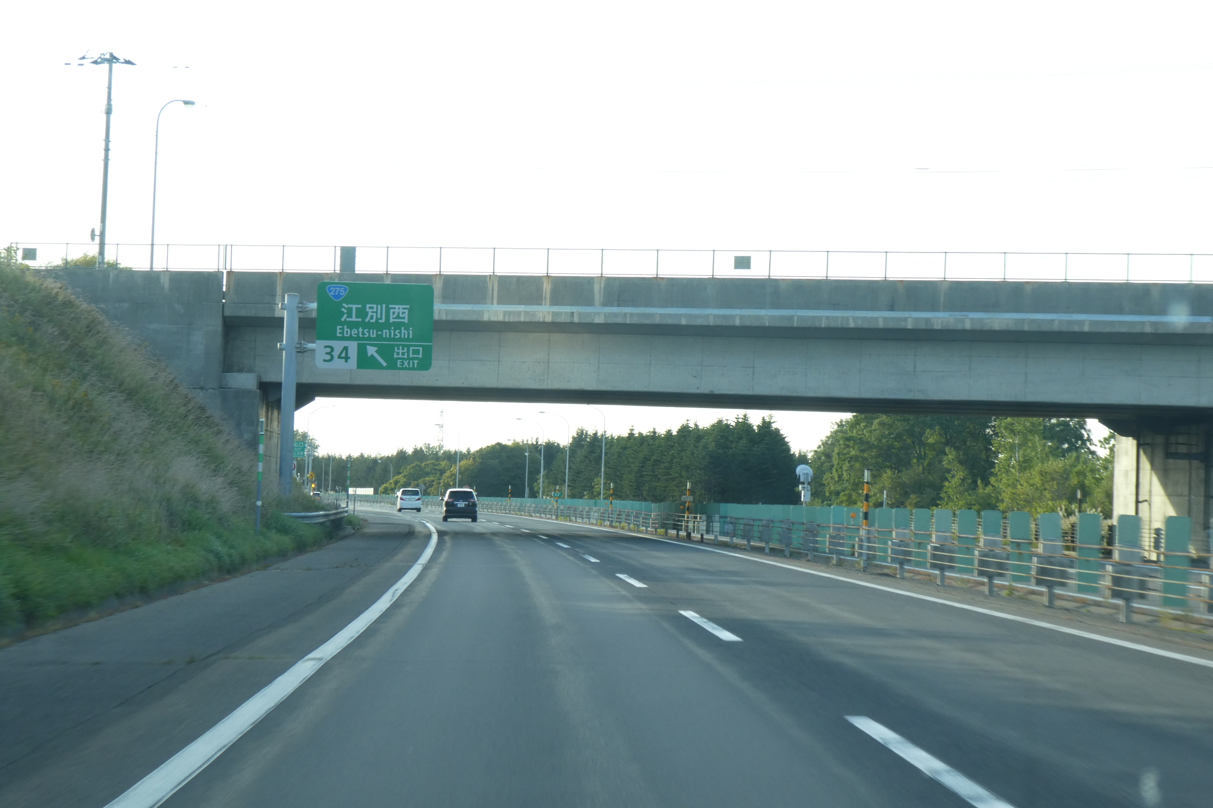 江別西インターチェンジ